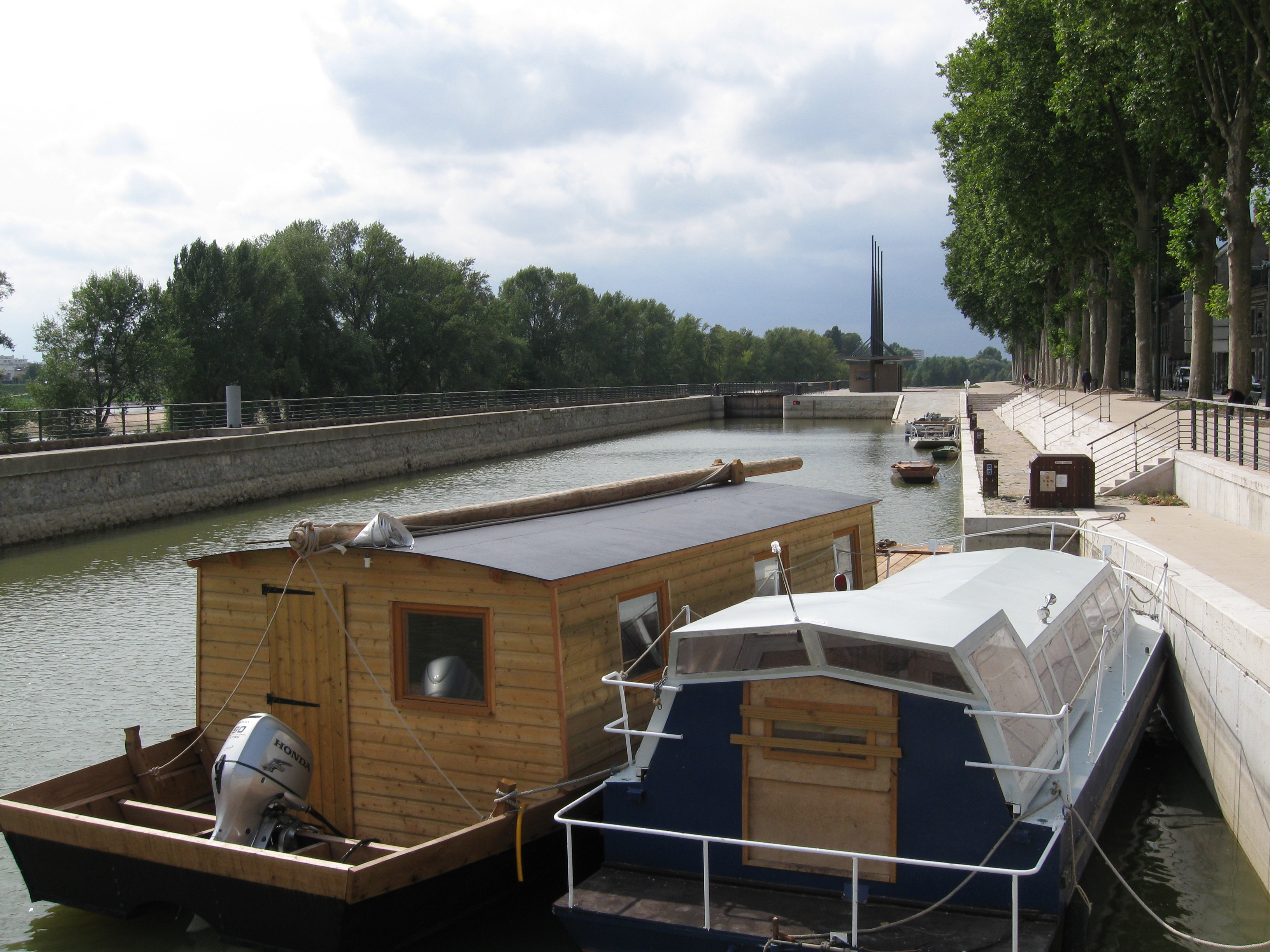 Le canal d'Orléans près de la dernière écluse à sa jonction avec la Loire, Orléans, Loiret, France